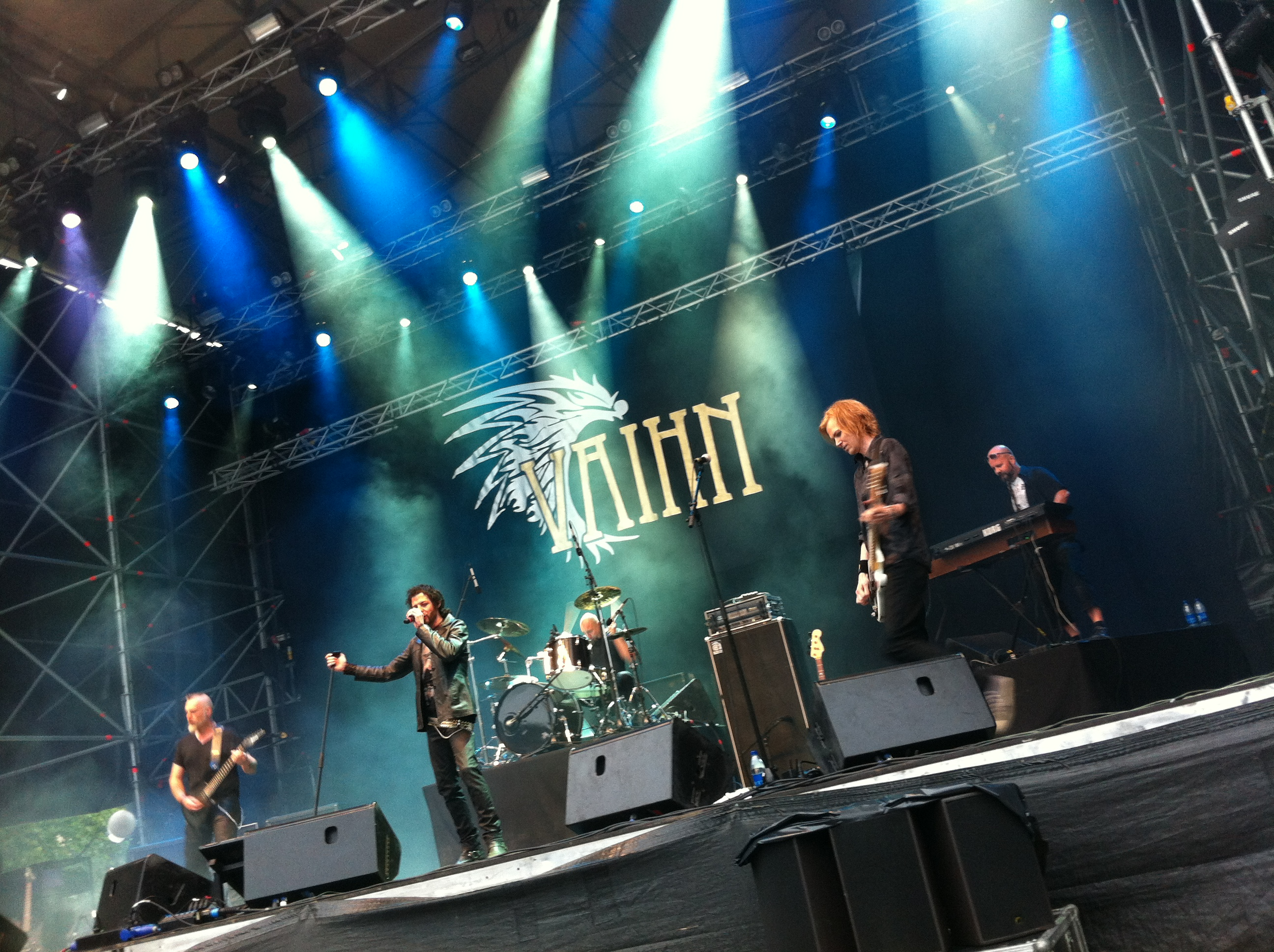 Rockbandet Vaihn under comebacken 2013 på Stadsfesten i Skellefteå.